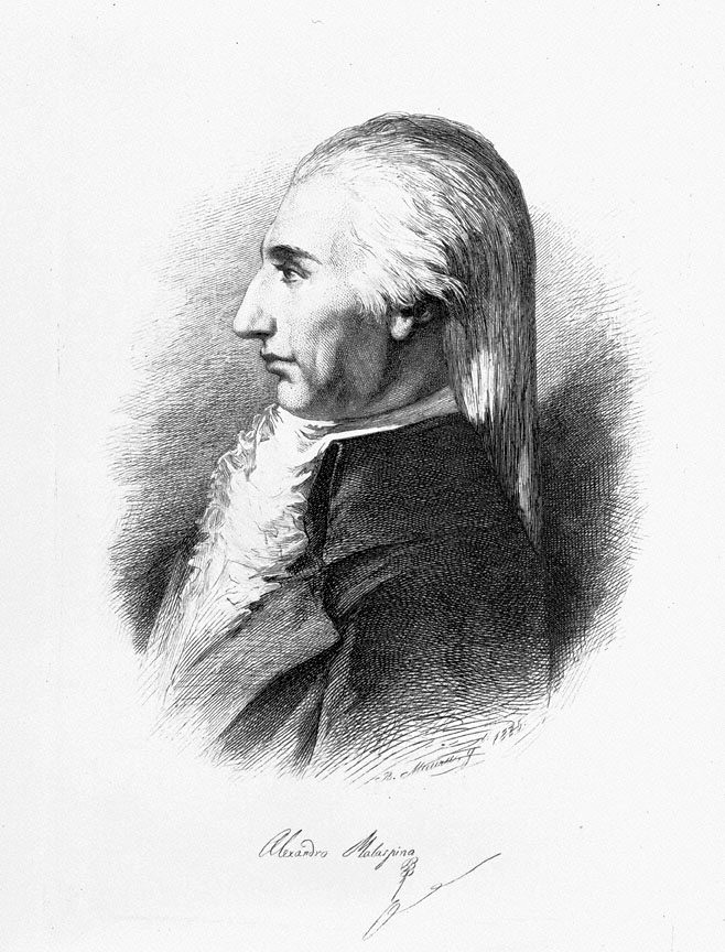 a. malaspina, naturalista en la roqueta